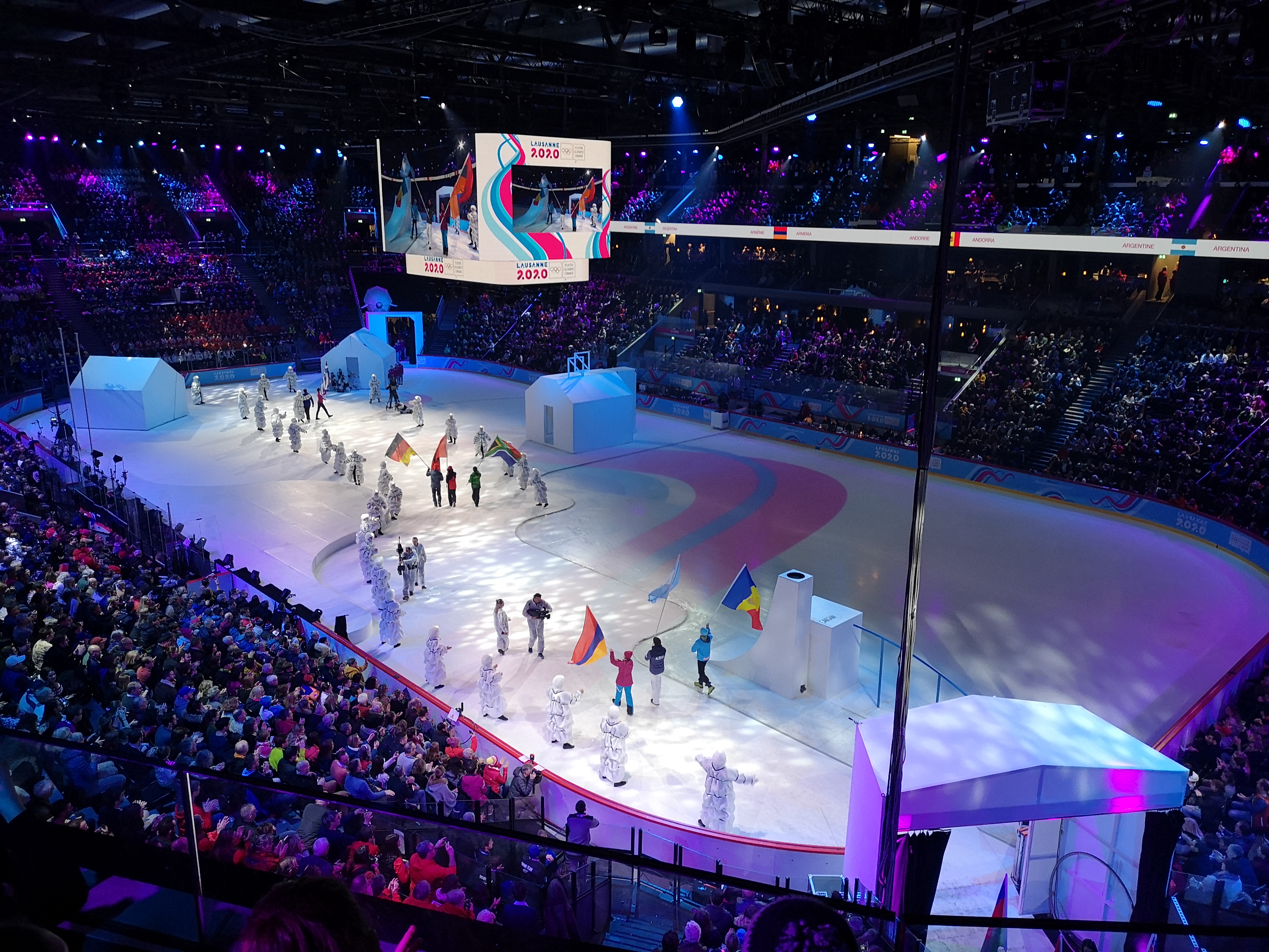 Les porte-drapeaux pendant la cérémonie d'ouverture des JOJ 2020.